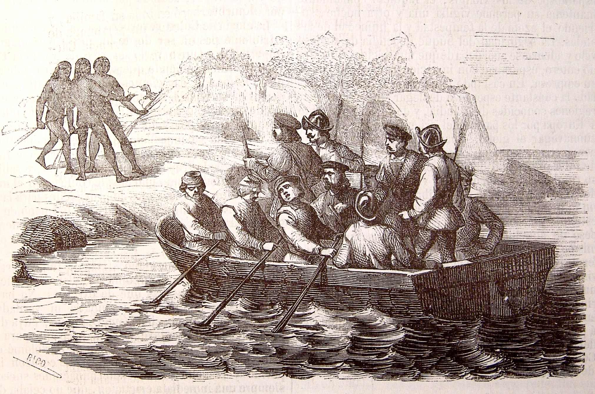 Enviando a tierra un bote por agua a Higuey provincia oriental de Española